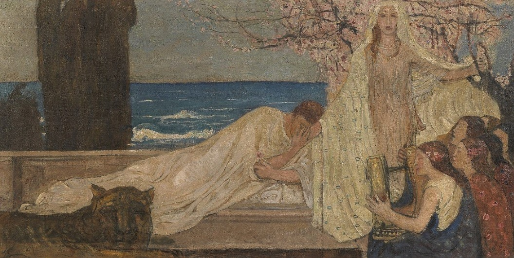 "La primavera", olio su tela, coll. privata